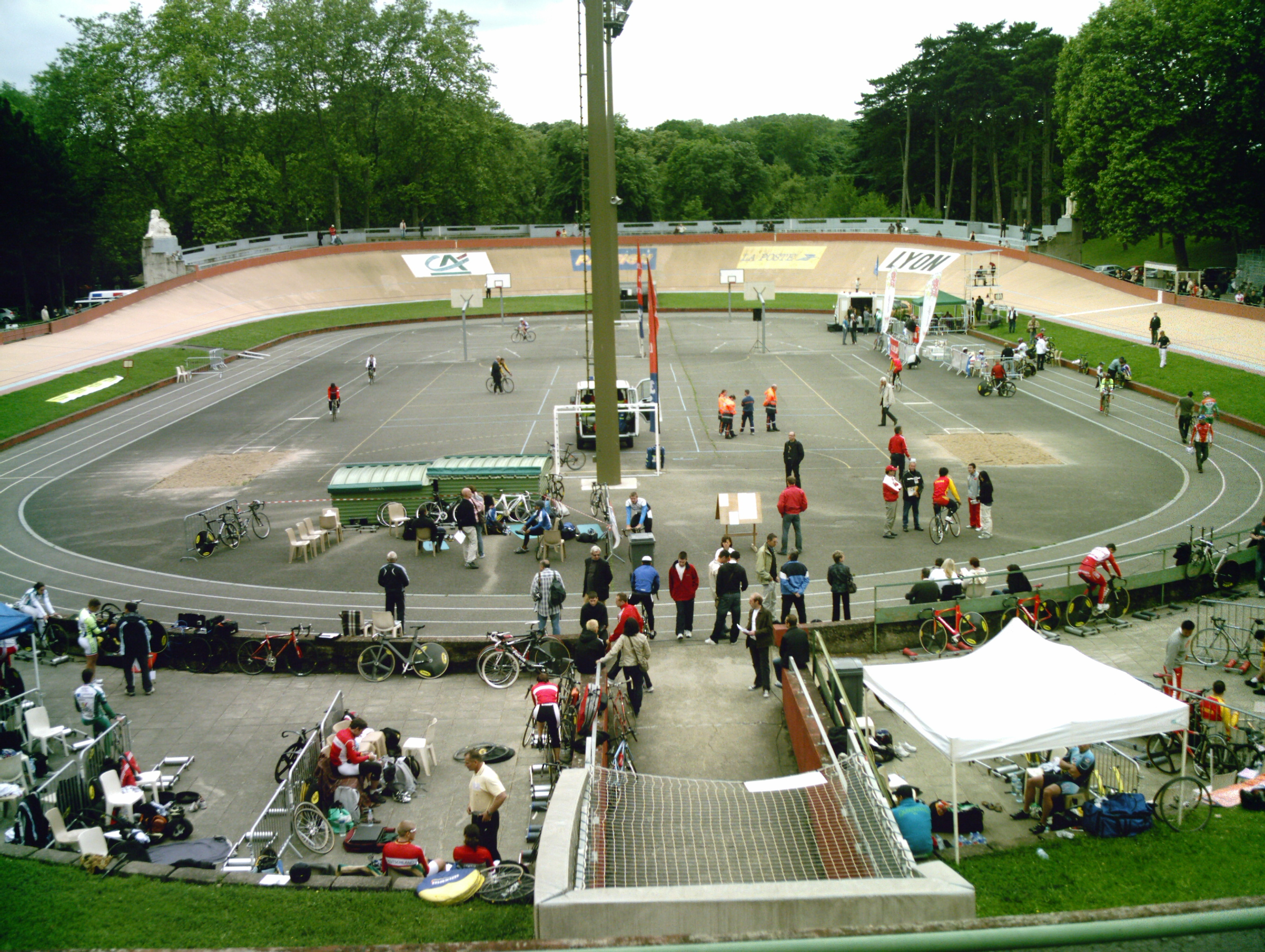 Vélodrome du Parc de la Tête d'Or (vue générale de l'intérieur) lors d'une compétition de cyclisme sur piste